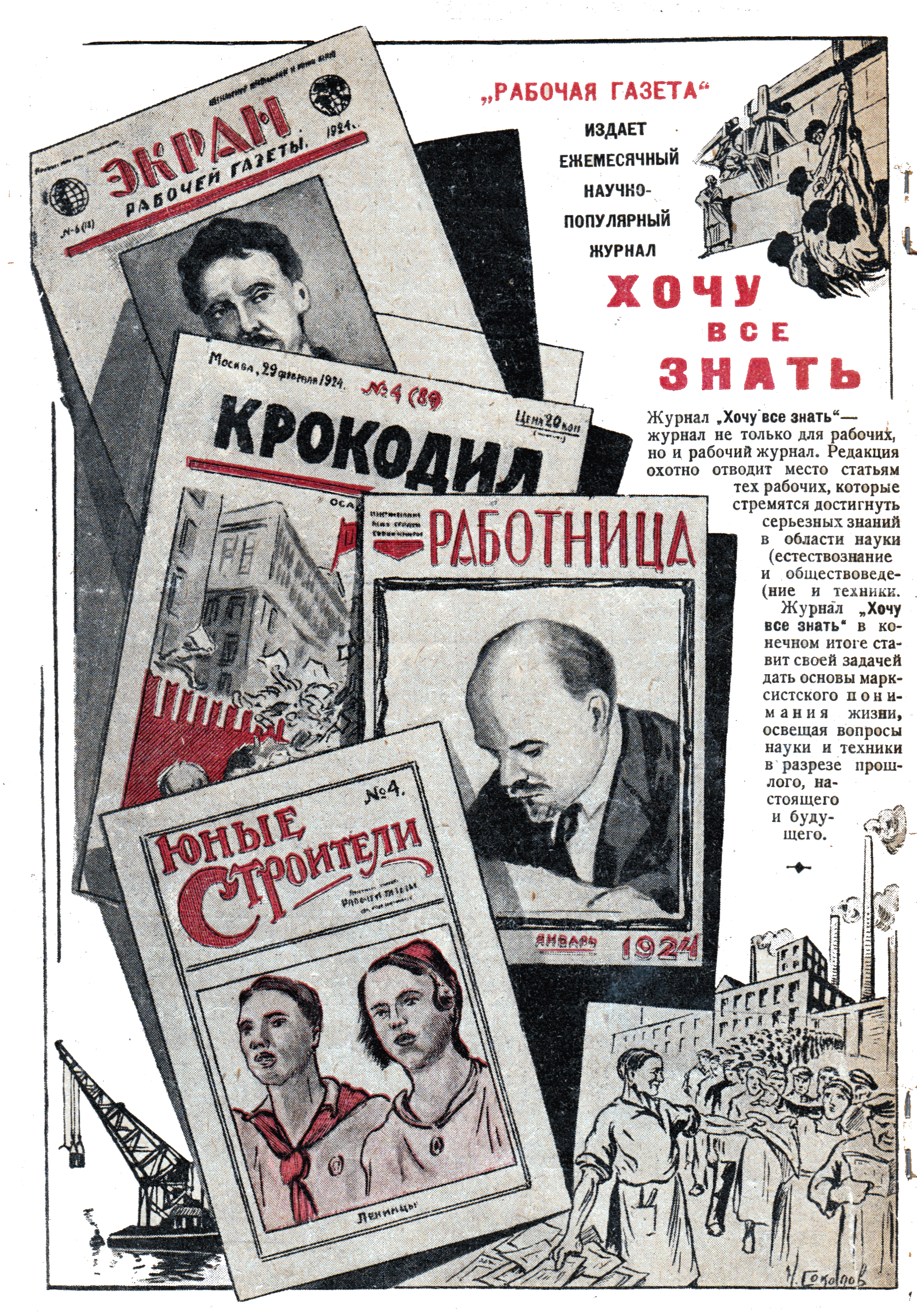 журнал Хочу всё знать